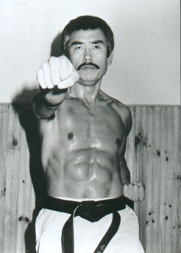 El pionero del estilo Karate-Do Gensei-Ryu en España el maestro Hiromichi Kohata